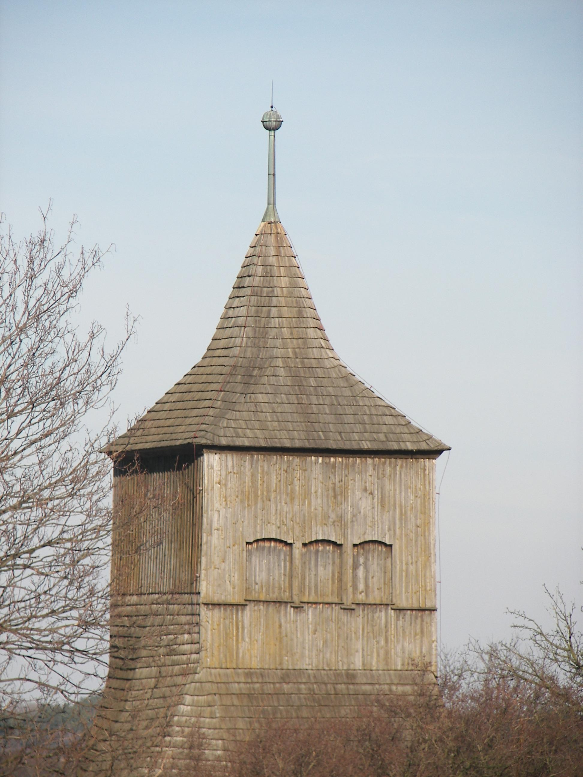 Zvonice v areálu kostela svatých Petra a Pavla v Přelíci.